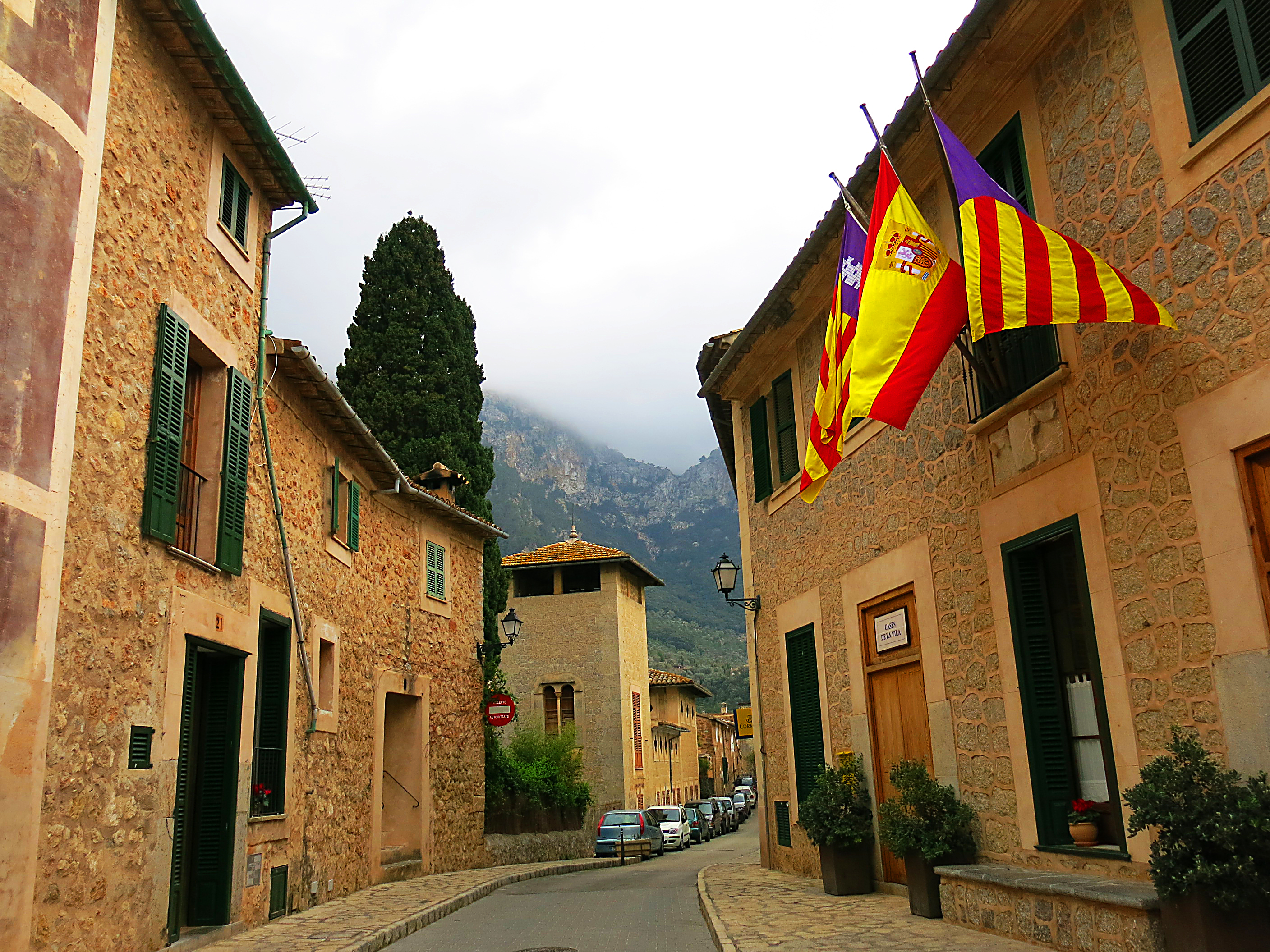 Conjunt històric de Deià V (Es Porxo)